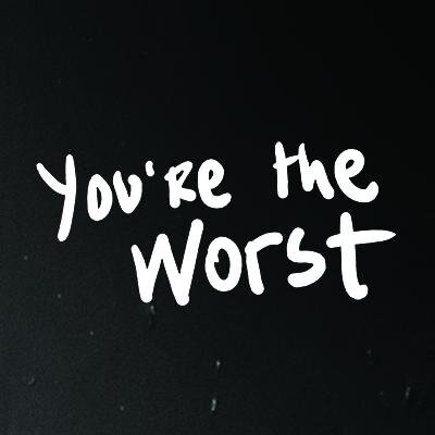 Logo original de la série.